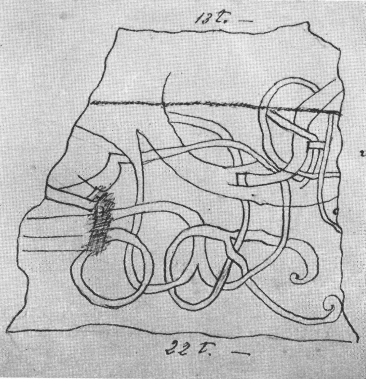 U 852. Balingsta kyrka. Efter bläckteckning av okänd i ATA.